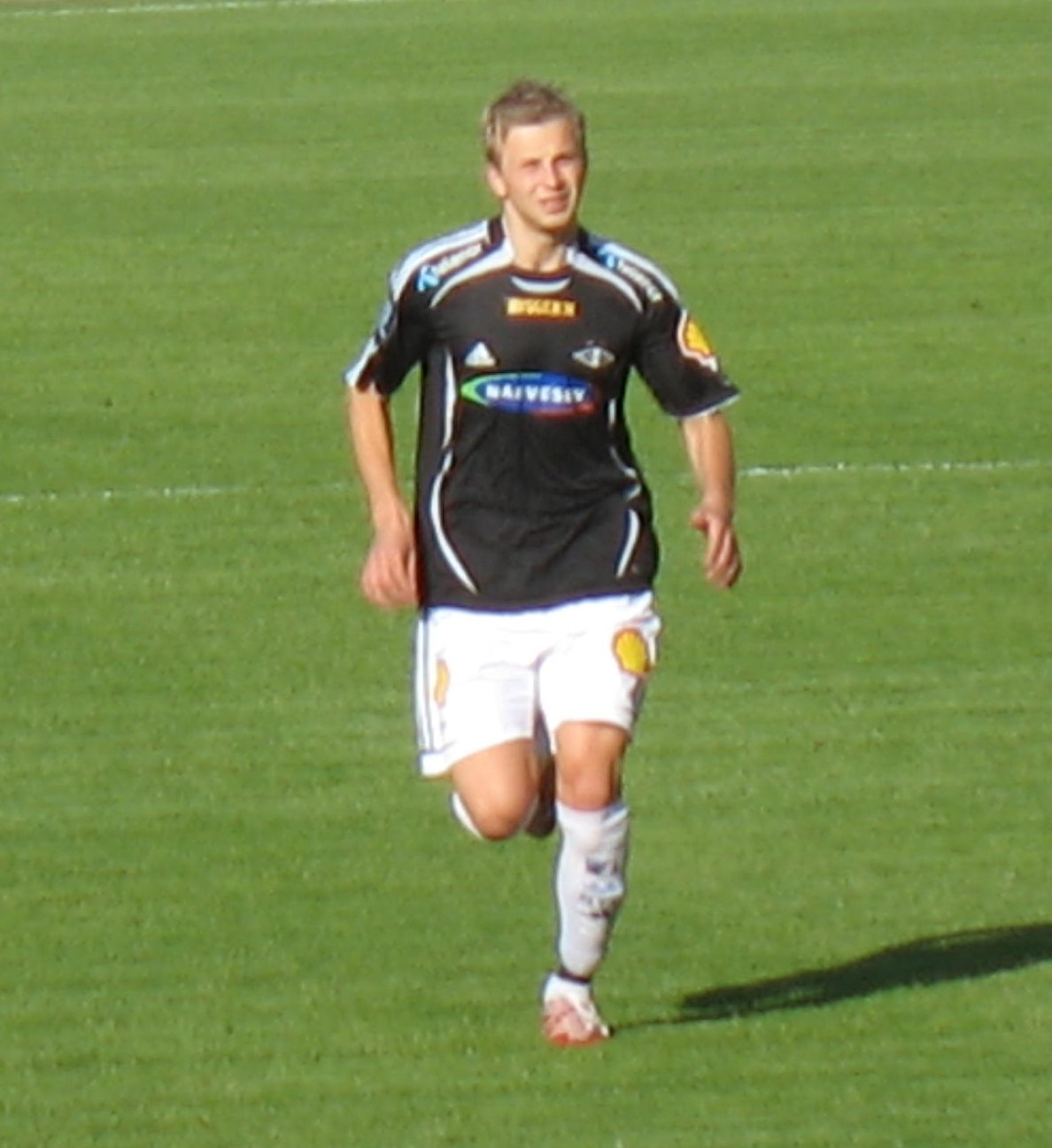 Fotballspilleren Marek Sapara